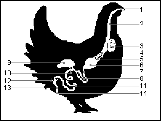 1. Bec, 2. Oesophage, 3. Jabot, 4. Jabot, 5. Estomac, 6. Gésier, 7. Intestin grêle, 8. Pancréas, 9. Foie, 10. Vésicule biliaire , 11. Iléon, 12. Caecums, 13. Gros intestin, 14. Cloaque